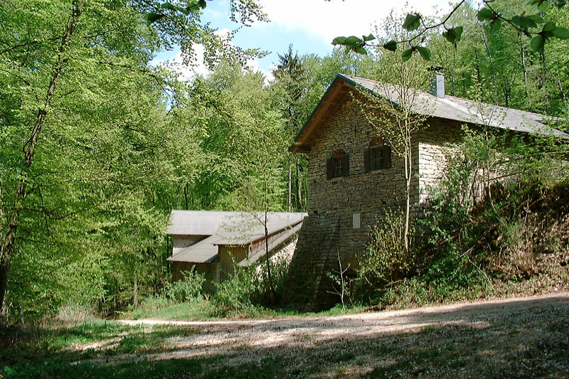 Felsenkeller im Wald, Marktberolzheim